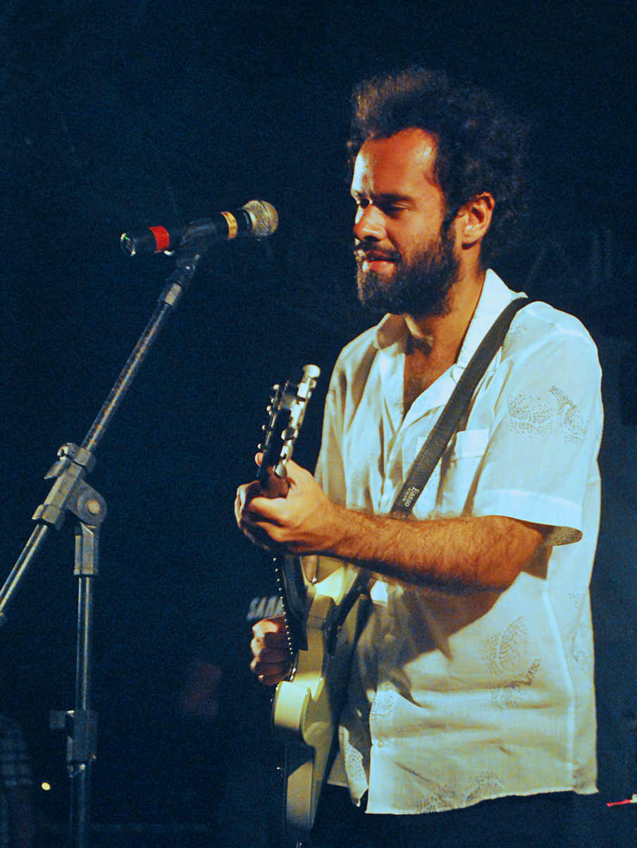 Domingo no campus.